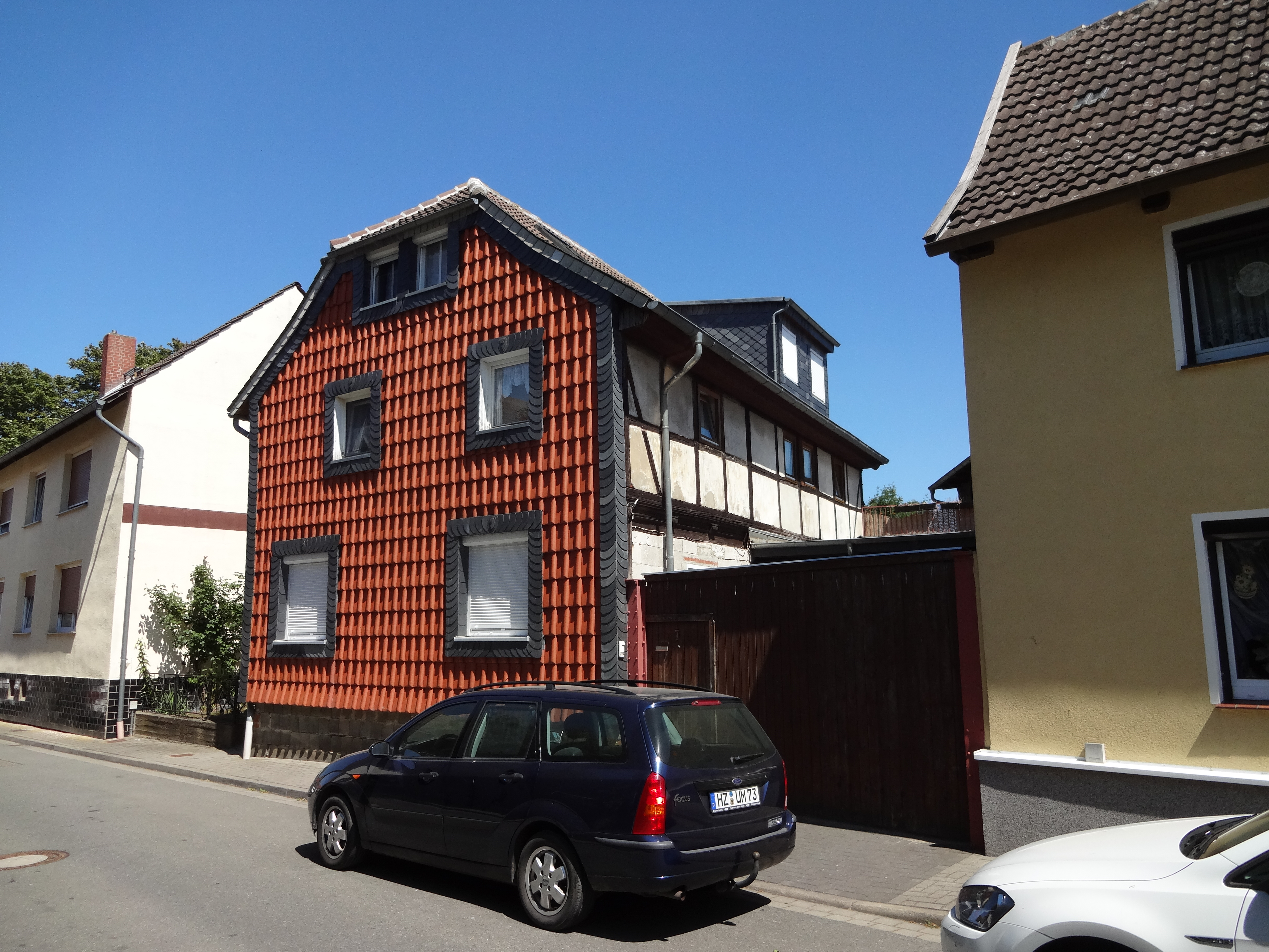 denkmalgeschützter Bauernhof in der Straße Im Pfeilern 7 in Dedeleben